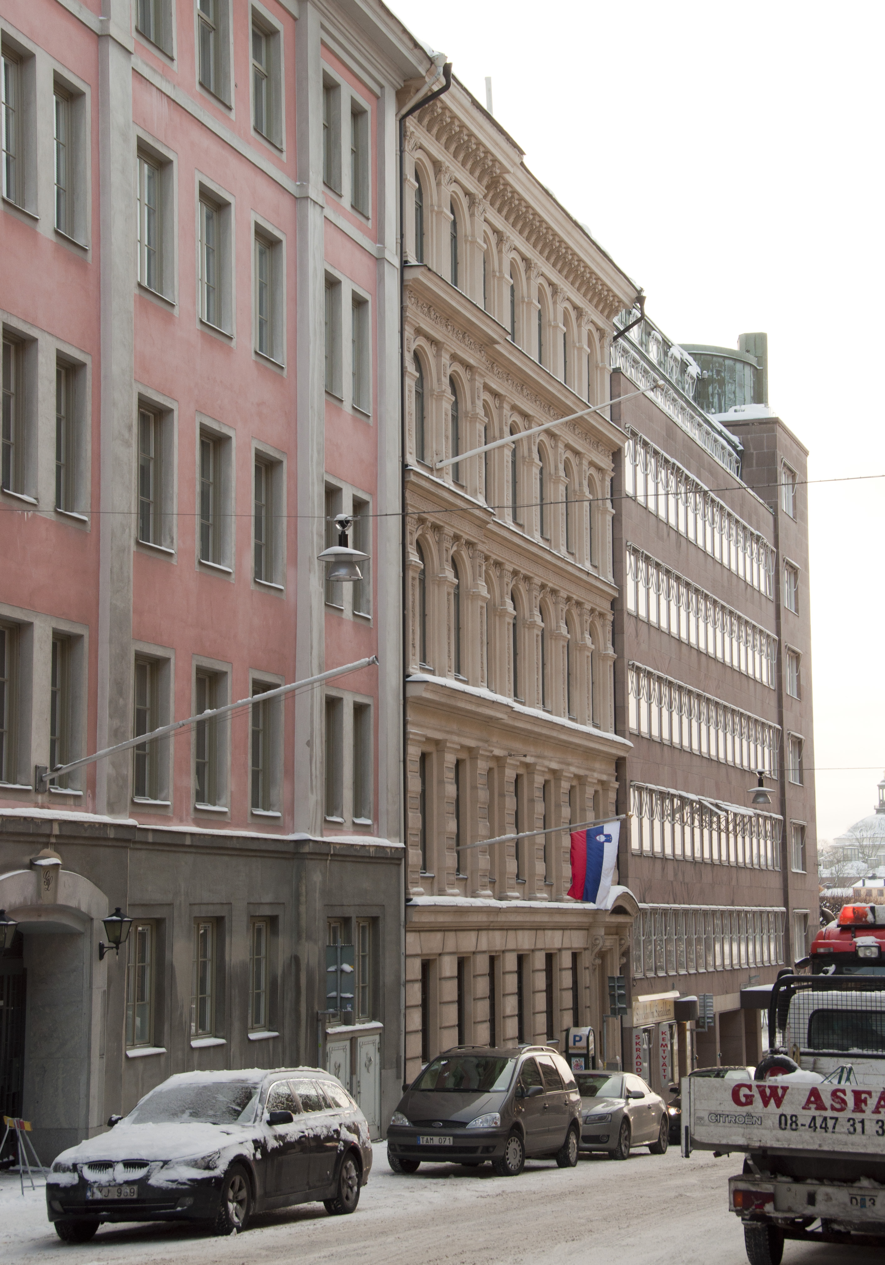 Styrmansgatan 4, Byggnadsår 1882-83, arkitekt Oskar Erikson, byggmästare Johansson & Hammarlund. Sloveniens ambassad